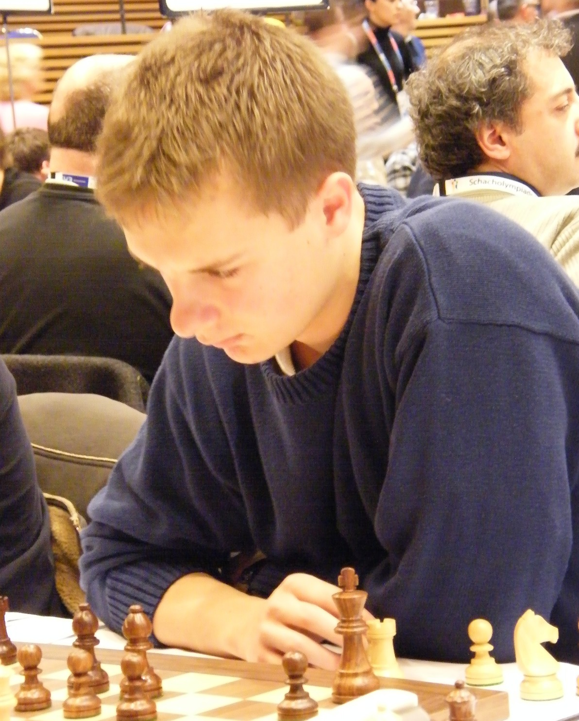 Falko Bindrich bei der Schacholympiade 2008 in Dresden